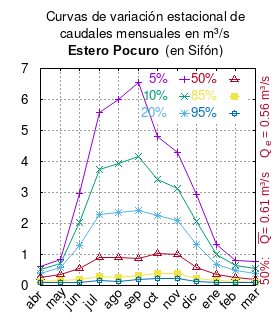 Curvas de variación estacional del estero Pocuro en Sífon. Dirección General de Aguas Diagnóstico y clasificación de los cursos y cuerpos de agua según objetivos de calidad. Cuenca del río Aconcagua. Santiago de Chile Ministerio de Obras Públicas (Chile) 2004 url: urlarchivo: Tabla 4.7: Estero Pocuro en Sifón pág. 56 mes 5% 10% 20% 50% 85% 95% abr 0.628 0.512 0.399 0.248 0.138 0.098 may 0.845 0.710 0.565 0.345 0.165 0.098 jun 2.958 2.034 1.292 0.543 0.187 0.100 jul 5.575 3.739 2.305 0.914 0.293 0.150 ago 6.003 3.940 2.366 0.893 0.269 0.133 sep 6.537 4.147 2.406 0.887 0.309 0.195 oct 4.798 3.419 2.268 1.035 0.394 0.223 nov 4.305 3.120 2.112 1.003 0.400 0.234 dic 2.944 2.060 1.338 0.586 0.212 0.117 ene 1.329 0.988 0.690 0.347 0.149 0.091 feb 0.816 0.637 0.471 0.265 0.130 0.086 mar 0.761 0.557 0.388 0.206 0.112 0.087 This plot was created with Gnuplot.